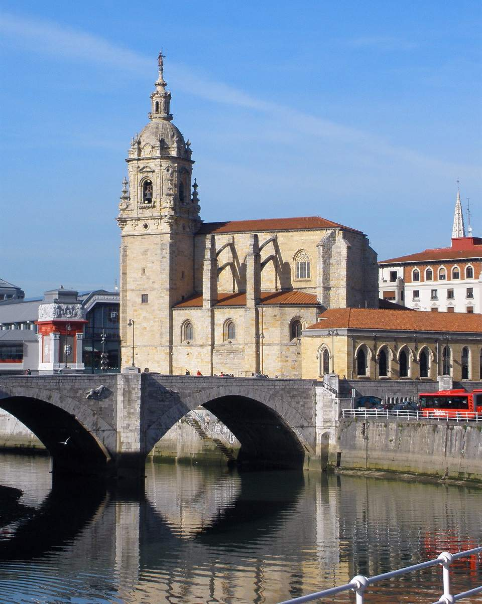 San Anton eliza, Bilbo